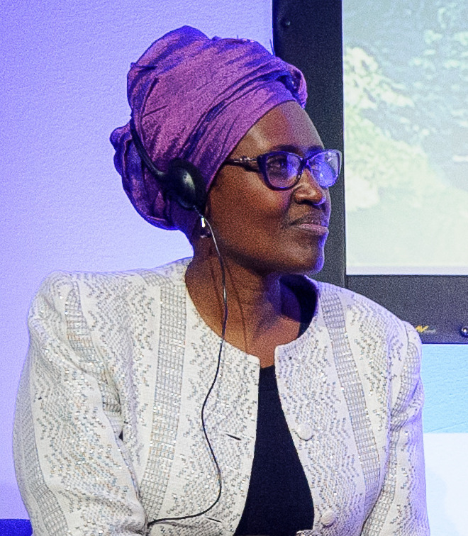 Conférence des Nations Unies sur les changements climatiques - COP21 (Paris, Le Bourget)